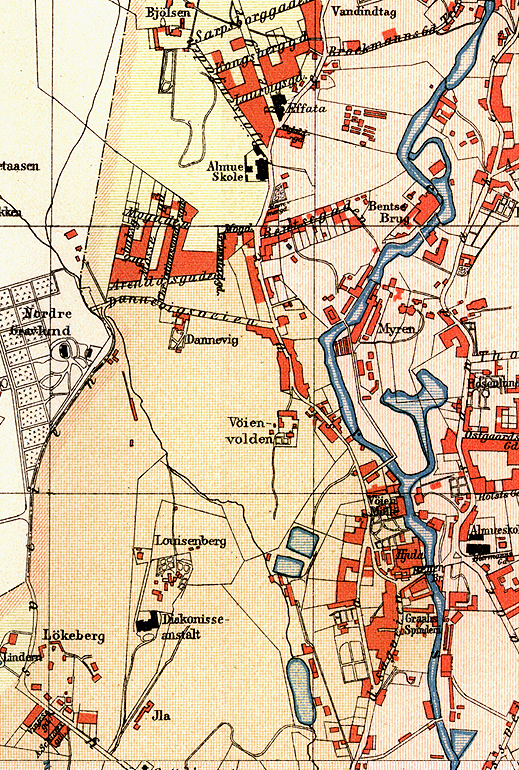 Kart over Sagene, 1887